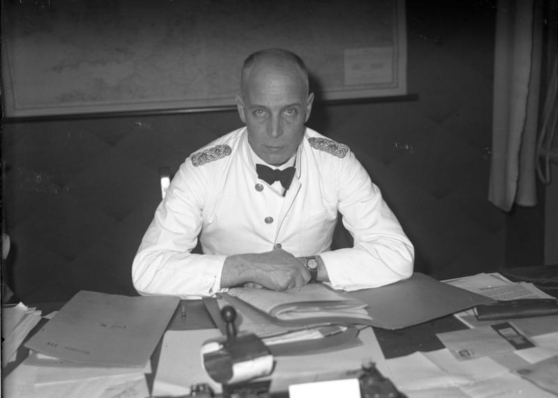 Kapitän zu See [Hermann] von Fischel der Kommandant des neuen deutschen Panzerkreuzers A. (Deutschland)! Kommandant [Hermann] von Fischel, wurde zum Führer des im April dieses Jahres fertiggestellten Panzerkreuzers A.(Deutschland) ernannt. Unser Bild zeigt ihn in seinem Arbeitszimmer im Reichswehrministerium in Berlin